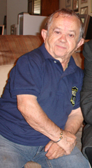 Felix Silla in St. Louis, Missouri